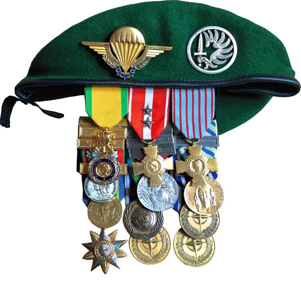 15 let v CL